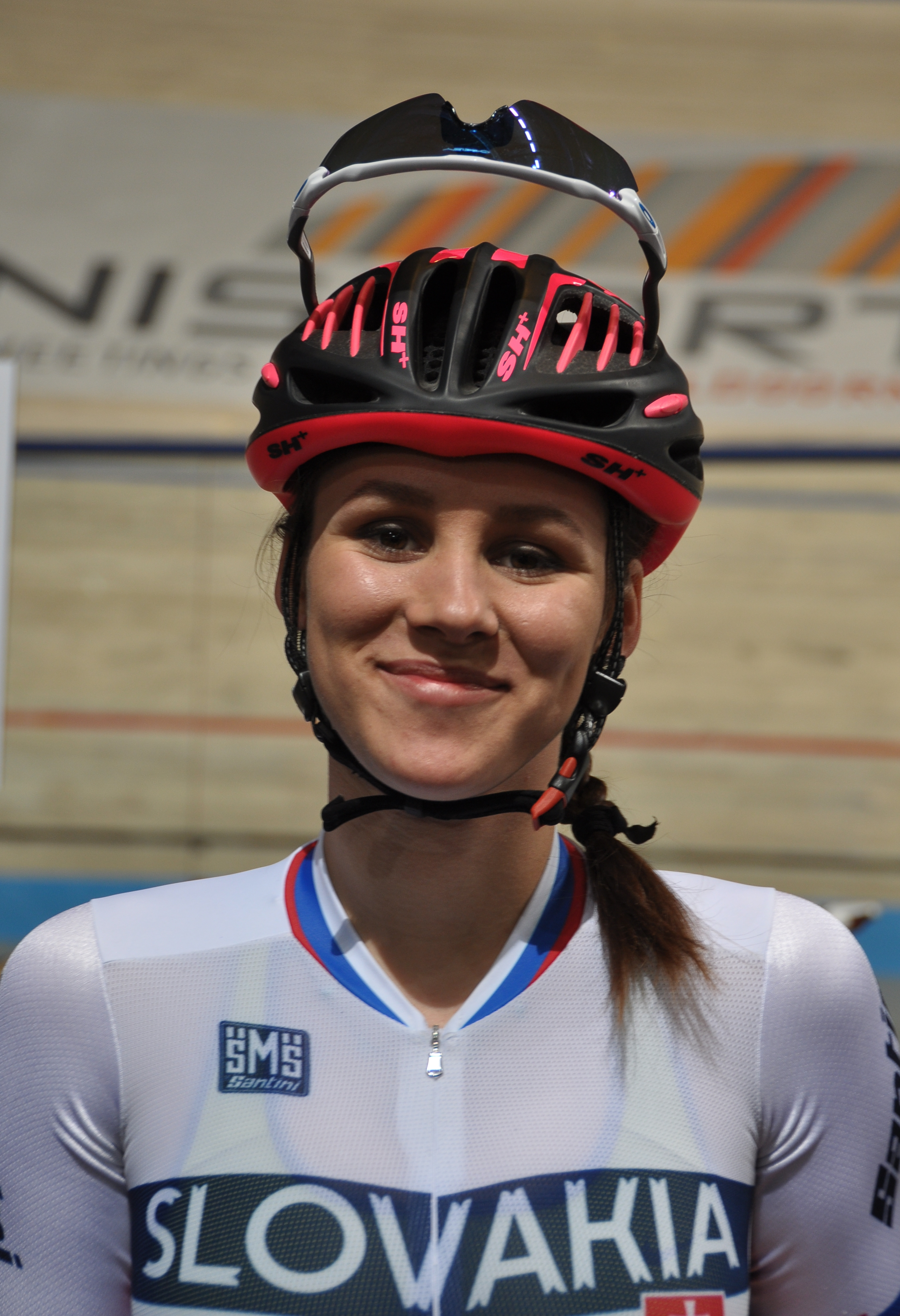 Tereza Medveďová, slowakische Radsportlerin